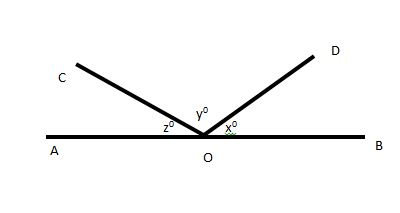 नेपाली: सरल कोण